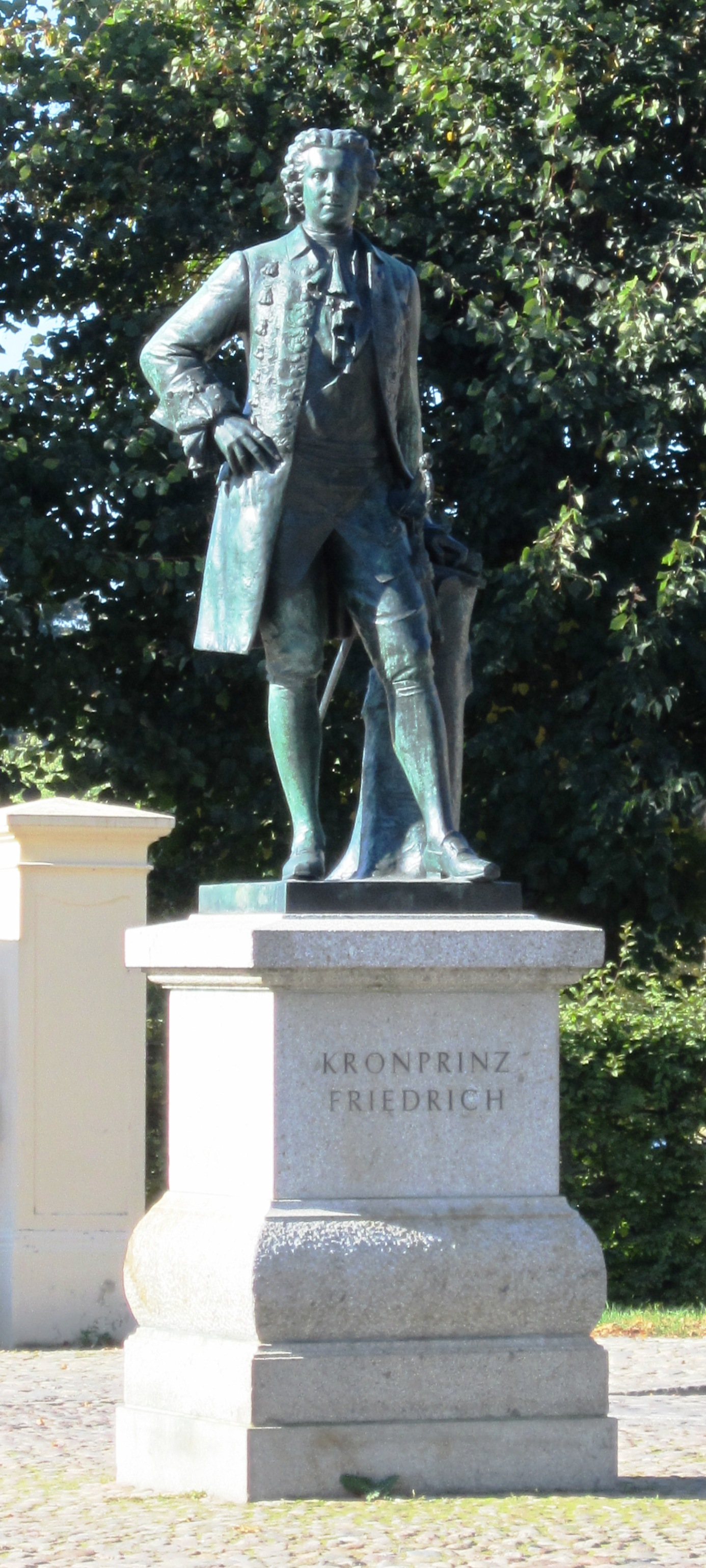 Denkmal für Kronprinz Friedrich in Rheinsberg